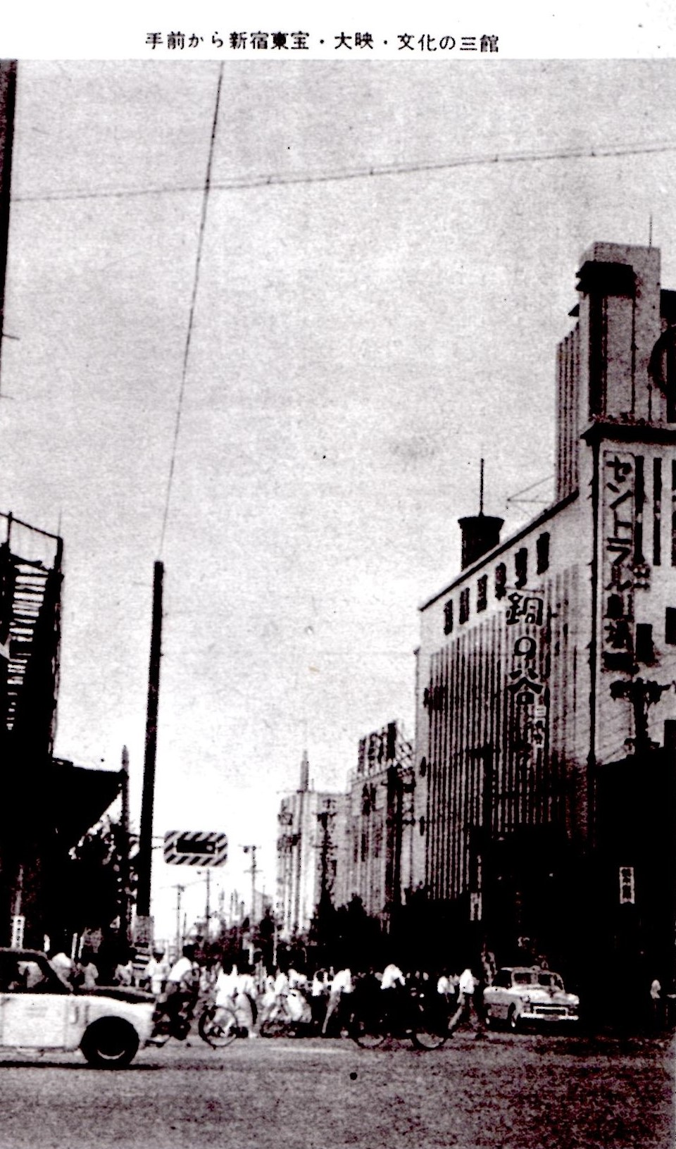 新宿の映画館「新宿東宝」「新宿大映」「新宿文化」。